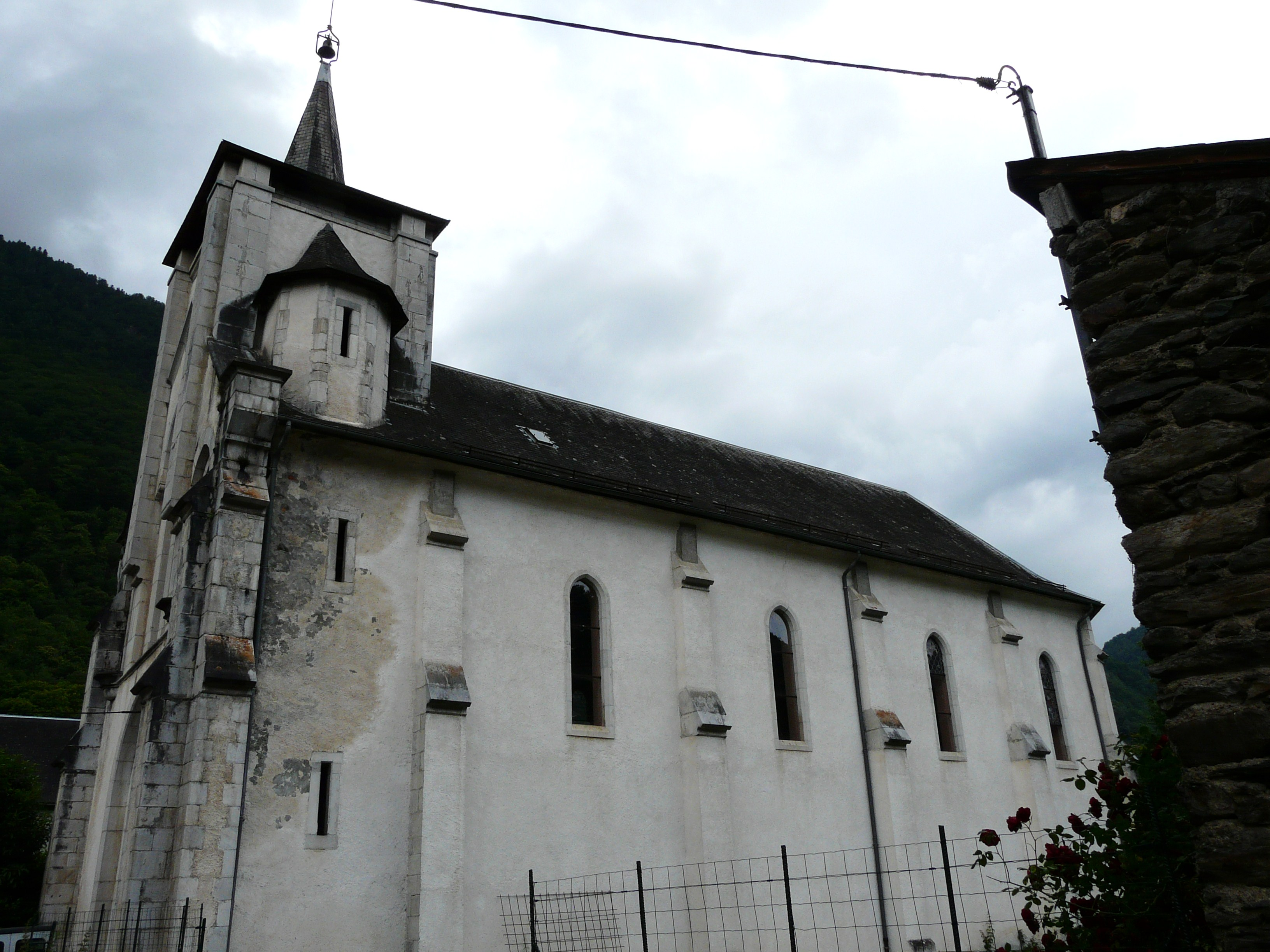 La façade nord-est de l'église d'Arlos, Haute-Garonne, France.